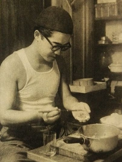 餃子を作る安部公房